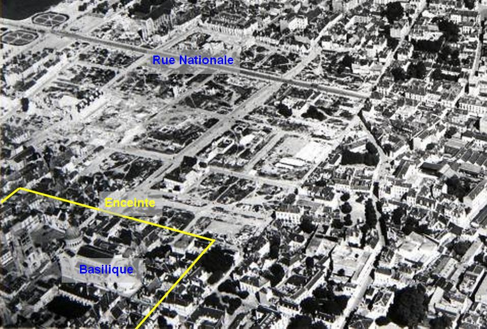 Tracé de l'enceinte de Châteauneuf (en jaune) dans le Vieux-Tours sinistré en 1948